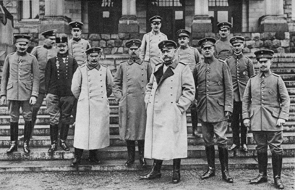 Field Marshal Paul von Hindenburg and his staff.